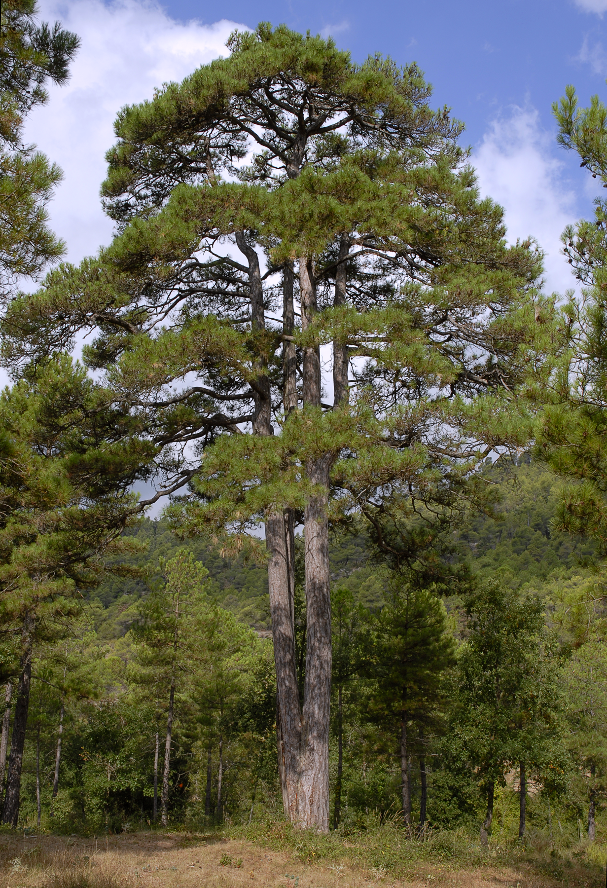 Image general de la Pinassa Pinus nigra de la Closella o Pinassa de les Tres Besses (Castellcir).